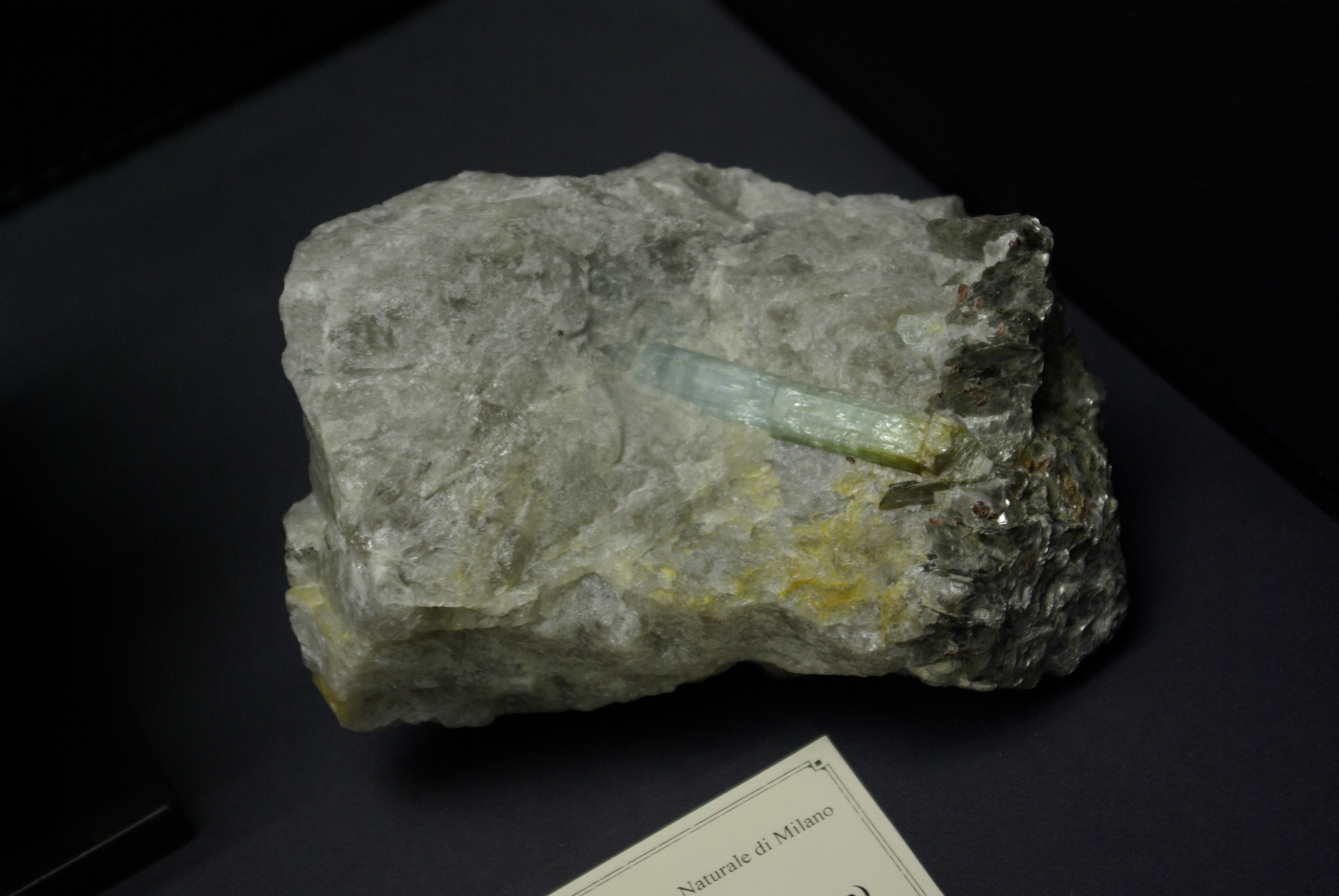 Museo civico di storia naturale This is a photo of a monument which is part of cultural heritage of Italy. pegmatite